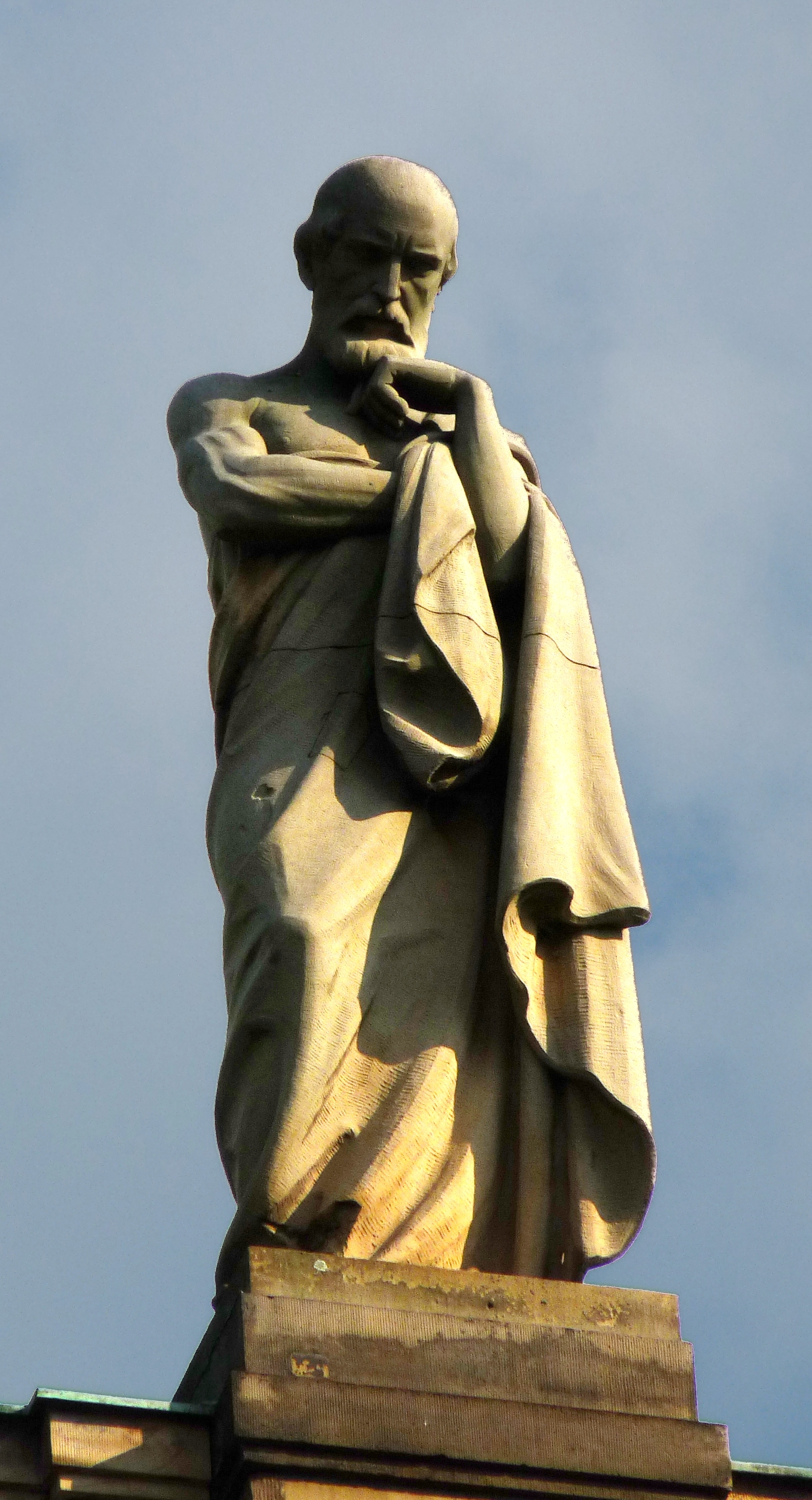 Allegorie der Dramatik von Melchior von Hugo, 4. Attikafigur (von links) auf dem Portikus des Großen Hauses der Staatstheater Stuttgart, 1912.